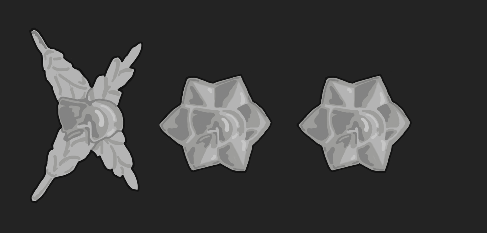 דרגות שירותי כבאות והצלה: רב טפסר